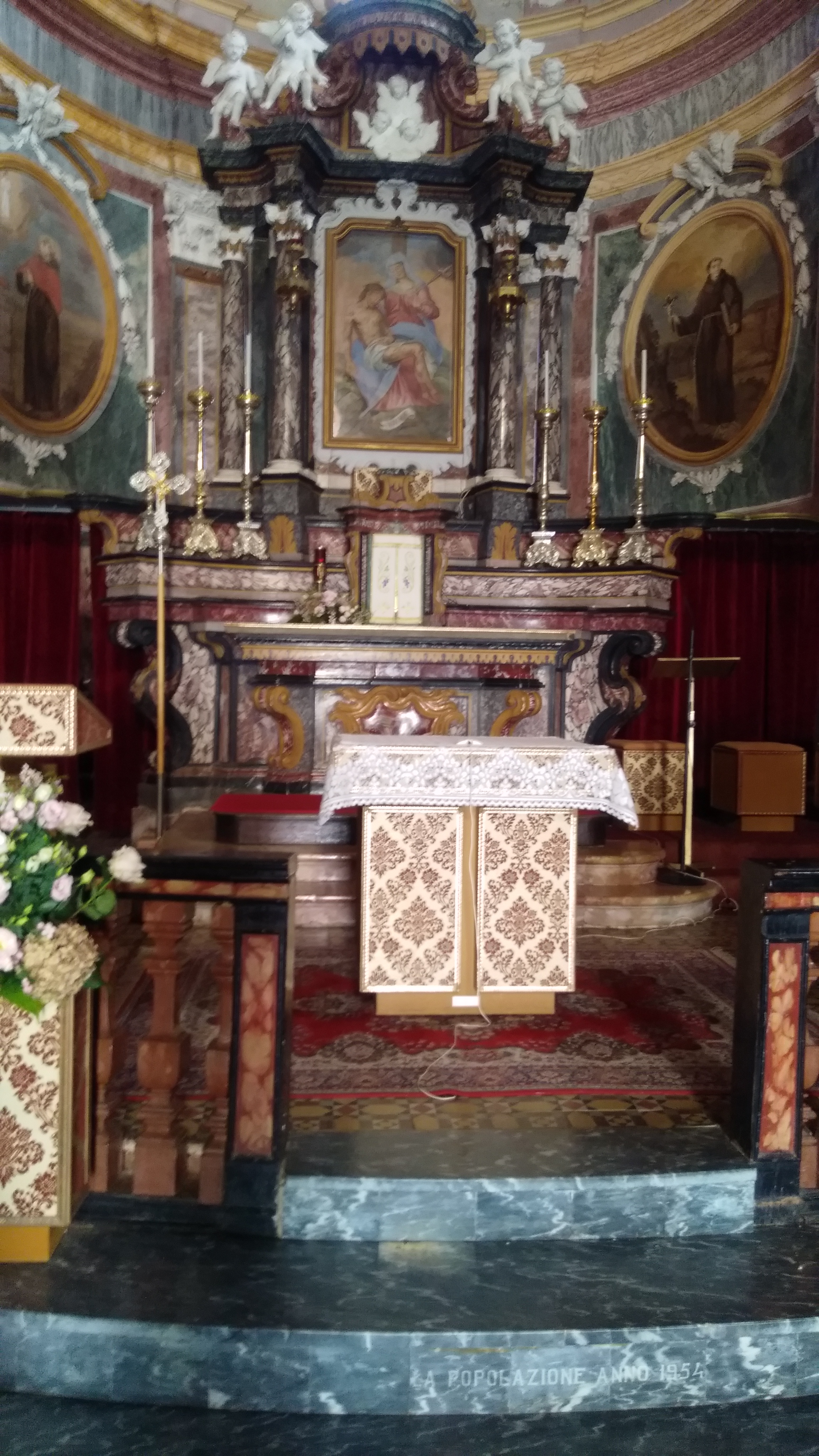 Cuceglio (TO) santuario dalla Beata Vergine Addolorata